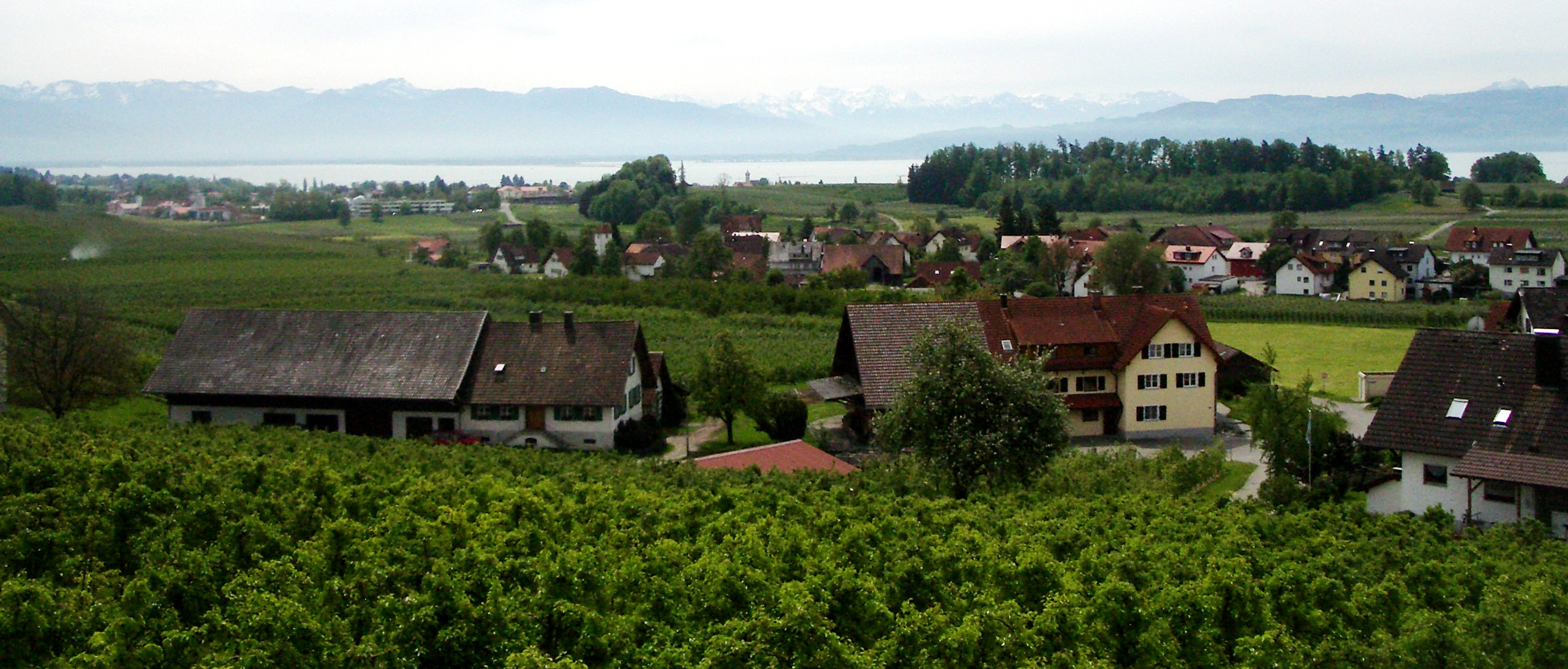 Aussicht von der Antoniuskapelle Selmnau über den Bodensee (Hintergrund: Schweizer Alpen) Wasserburg am Bodensee, Kreis Lindau, Bayern